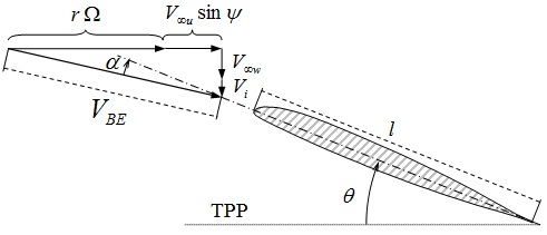 Principe de décomposition d'une pale de rotor d'hélicoptère en éléments. Vitesse et incidence.